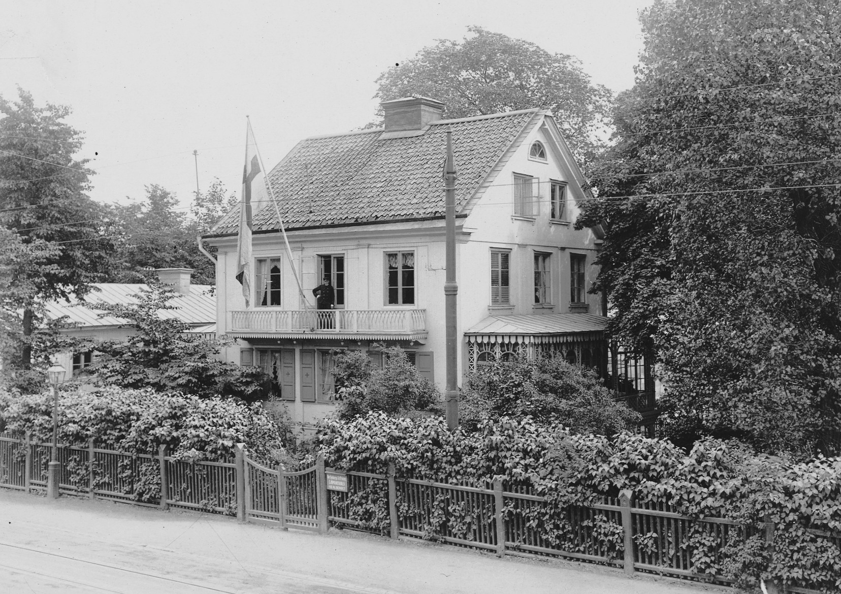 Alberget 4B, Rydbergska stiftelsens hus, Sjömansskola